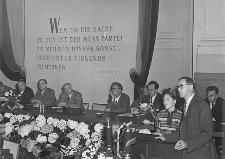 Berlin, II. VBK-Kongress, W. H. Kemenow Zentralbild Sturm 9.6.1952 II. Kongress des Verbandes der bildenden Künstler. In Berlin findet vom 7. bis 9.6.1952 der II. Kongreß des Verbandes der bildenden Künstler im Plenarsaal der Akademie der Künste statt. UBz: Der sowjetische Kunsthistoriker W. S. Kemenow bei seiner Begrüssungsansprache. Abgebildete Personen: Nagel, Otto Prof.: Maler, Präsident der Akademie der Künste (AdK), Nationalpreisträger, Vaterländischer Verdienstorden (VVO) in Gold, DDR (GND 118586300) Kemenow, Wladimir S.: Kunsthistoriker, Sowjetunion (GND 121657302) Information added by Wikimedia users.Einleitung in die Propyläen. Link